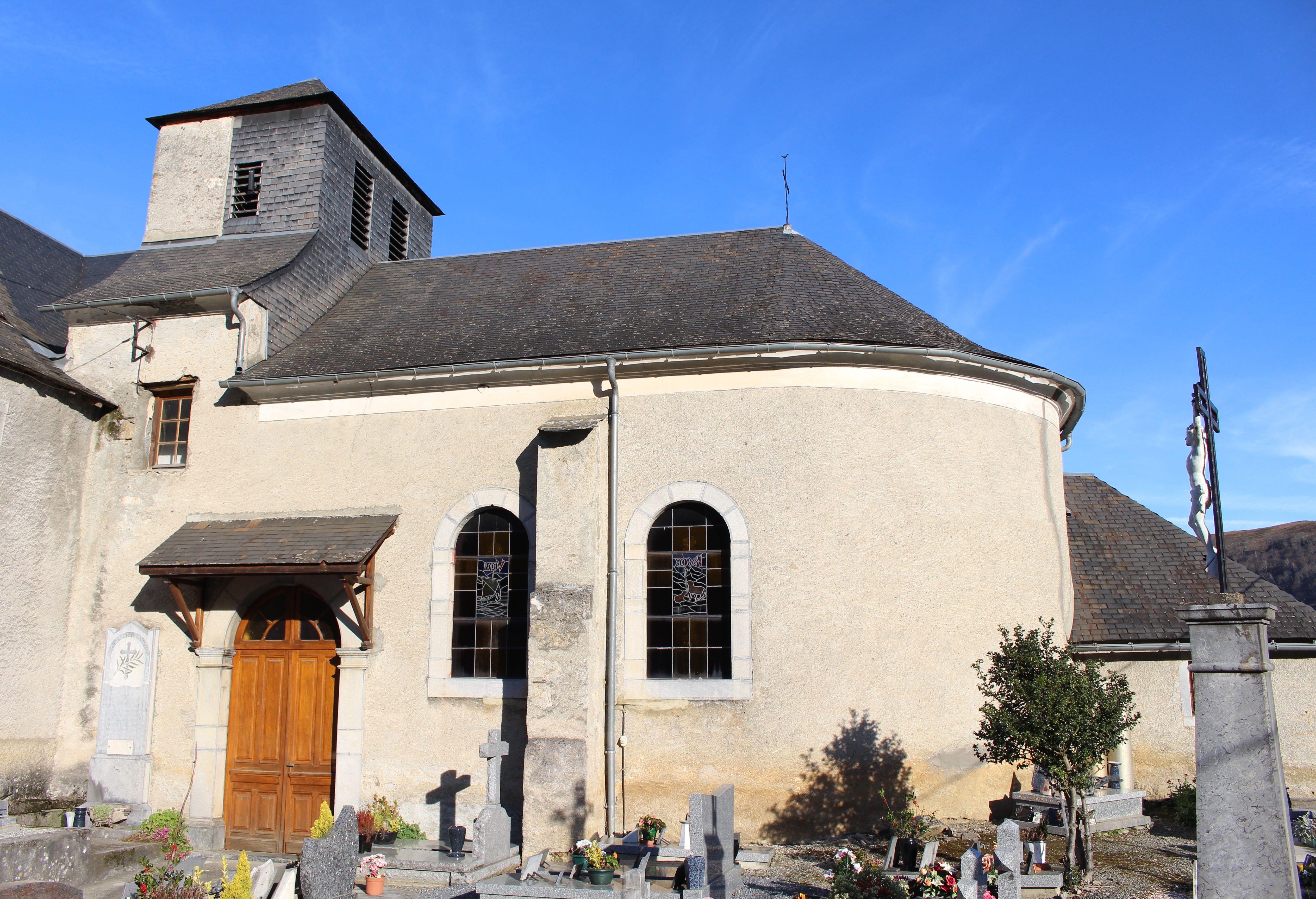 Église Saint-Pierre d'Ousté (Hautes-Pyrénées)